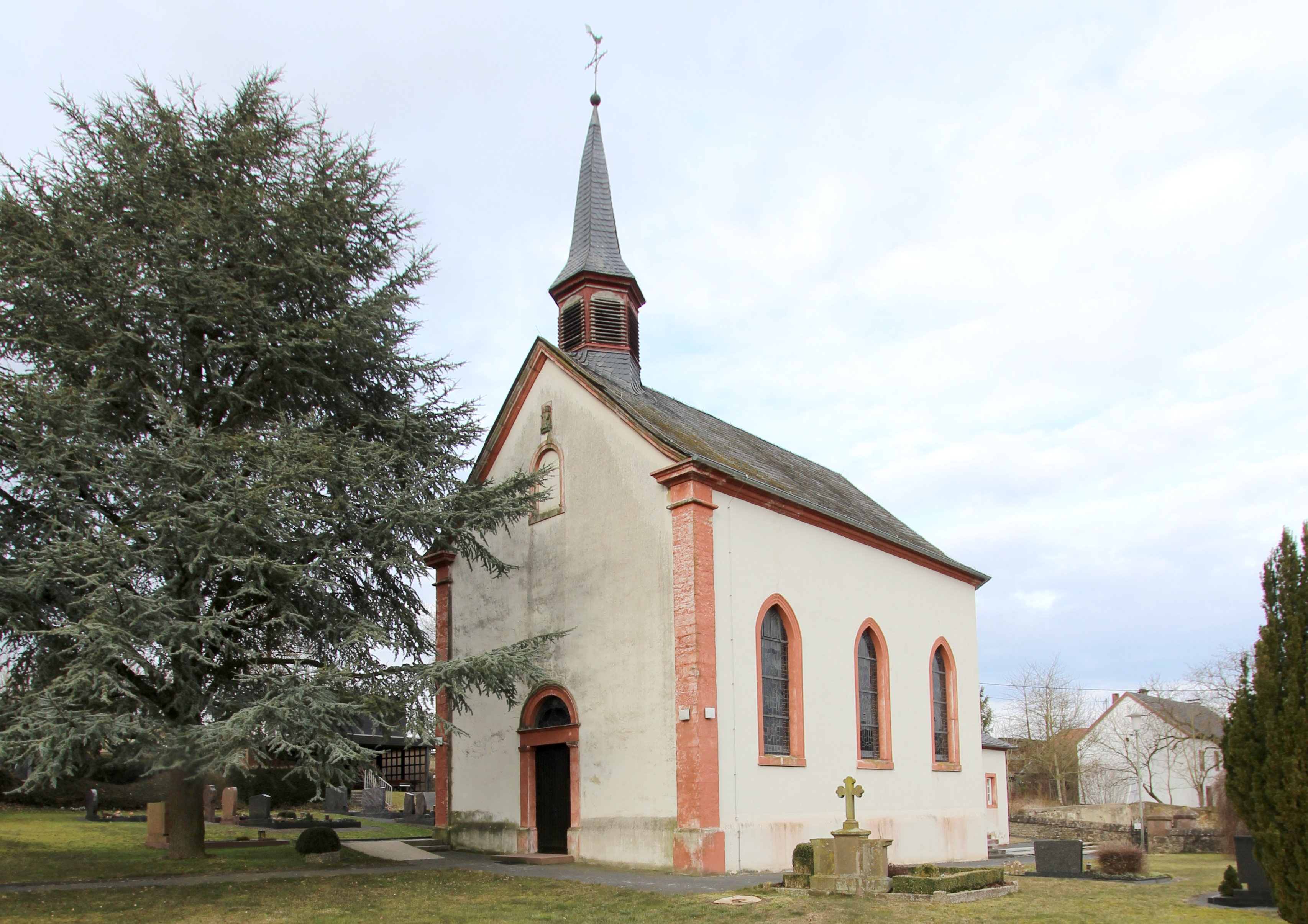 54634 Matzen, obere Donatusstraße. Saalbau, spätbarocke und neugotische Motive, 1816; zum Kriegerdenkmal erweitertes neugotisches Friedhofskreuz, 1887. Aufnahme von 2018.